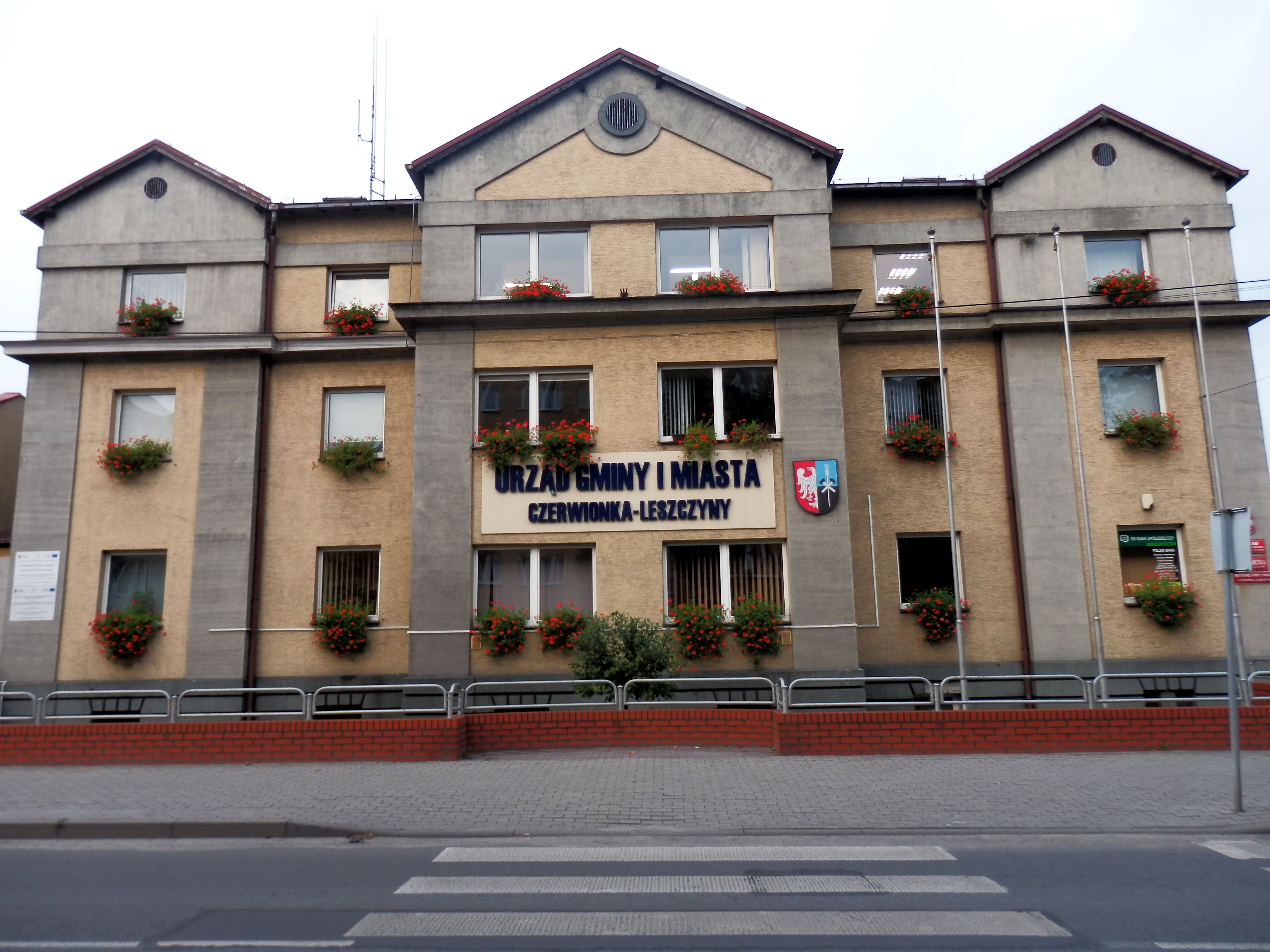 Czerwionka-Leszczyny, dwór w Czerwionce, ob. budynek urzędowy gminy, kon. XIX w.